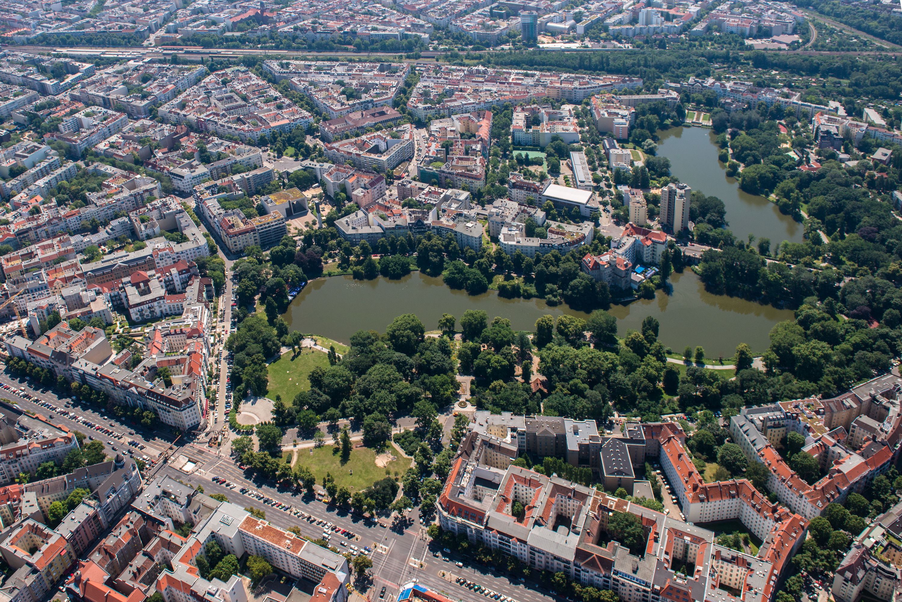 Ein Blick auf den Lietzensee in Berlin Charlottenburg.